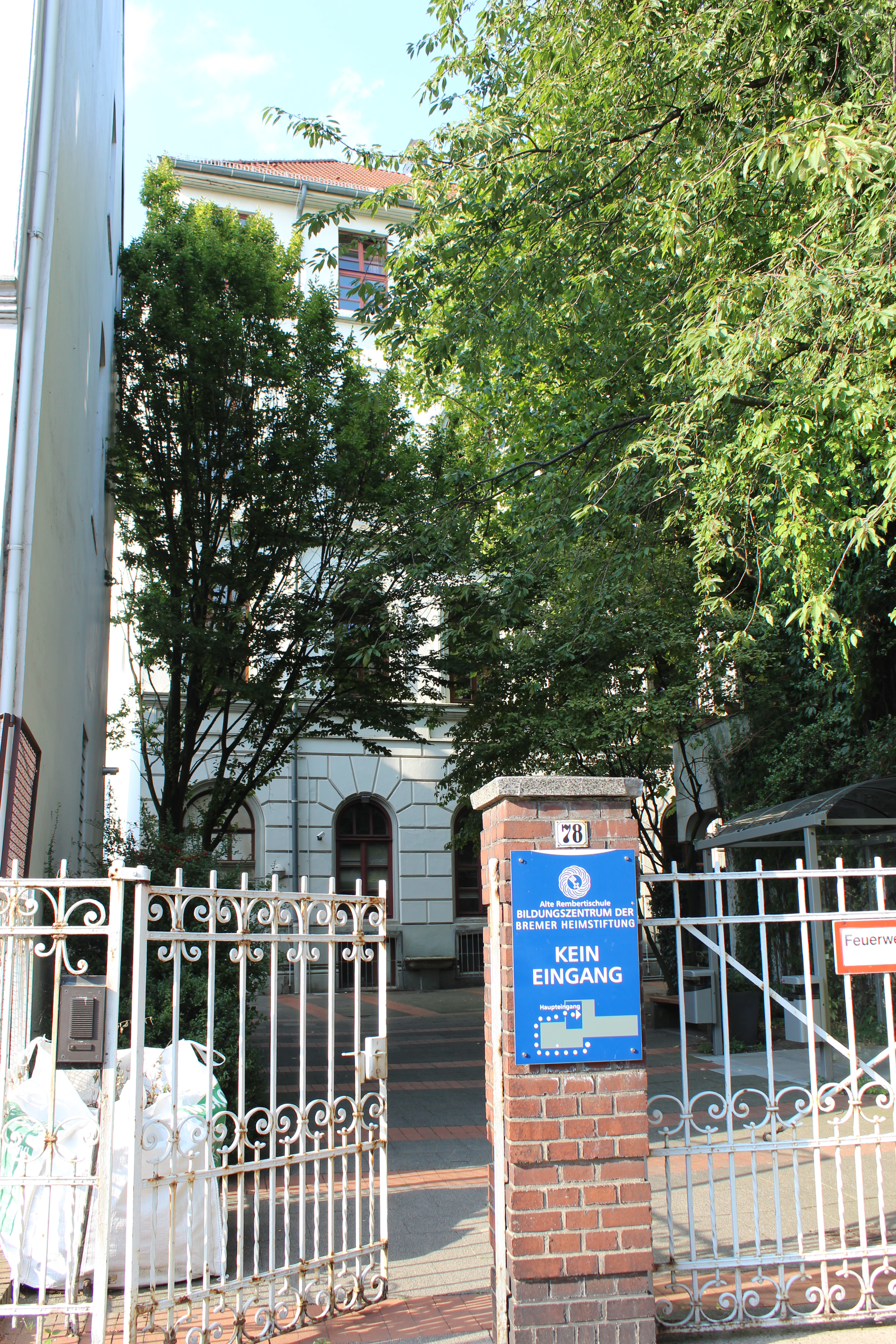 Kirchspielschule St. Remberti in Bremen, Fedelhören 78Das abgebildete Objekt ist ein geschütztes Kulturdenkmal in der Freien Hansestadt Bremen, mit der Nr. 0344 beim Landesamt für Denkmalpflege registriert.